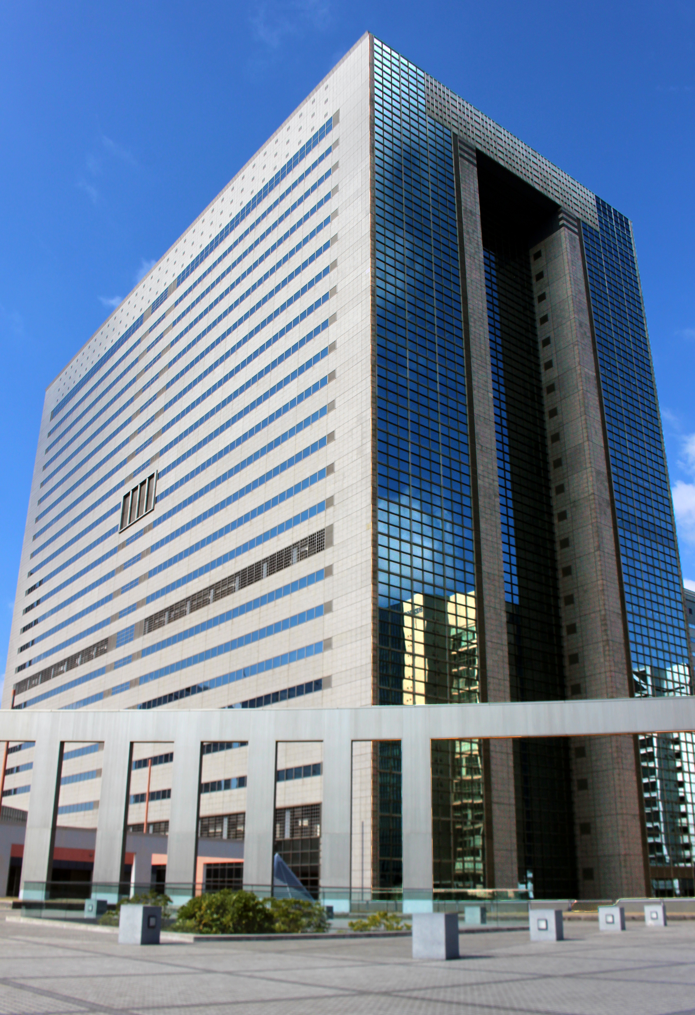 m BAY POINT幕張